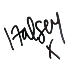 Signatura de Hasley